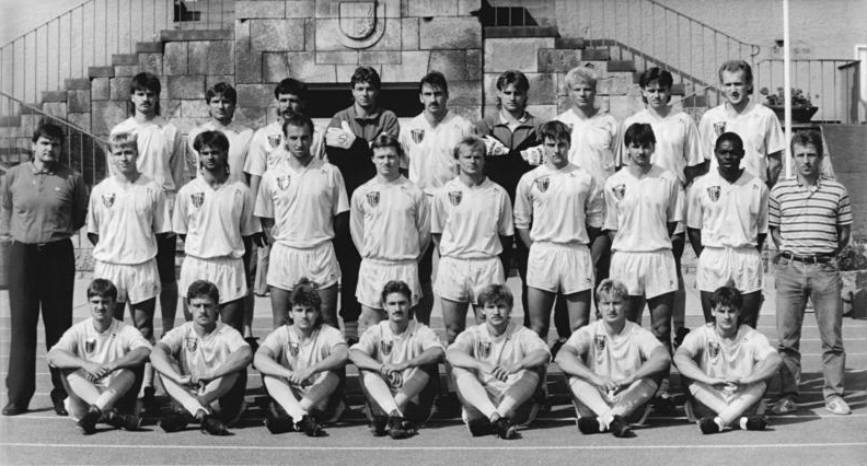 ADN-Wolfgang Thieme 10.8.90 Chemnitz: Fußball. Mannschaftsfoto des FC Chemnitz. In der oberen Reihe, v.l. Lutz Wienhold, Meik Faßl, Peter Keller, Jens Schmidt, Dirk Barfikow, Holger Hiemann, Jan Seifert, Ulf Mehlhorn, Jozef Dzurjak; mittlere Reihe, v.l. Cheftrainer Hans Meyer, Sven Köhler, Rico Steinmann, Harald Krämer, Jörg Illing, Mario Neuhäuser, Arndt Spranger, Tino Müller, Ojokojo Torunarigha, Assistenztrainer Christoph Franke; untere Reihe v.l. Steffen Ziffert, Detlef Müller, Thomas Laudeley, Lars Hermel, Jens Mitzscherling, Steffen Heidrich, Torsten Bittermann.